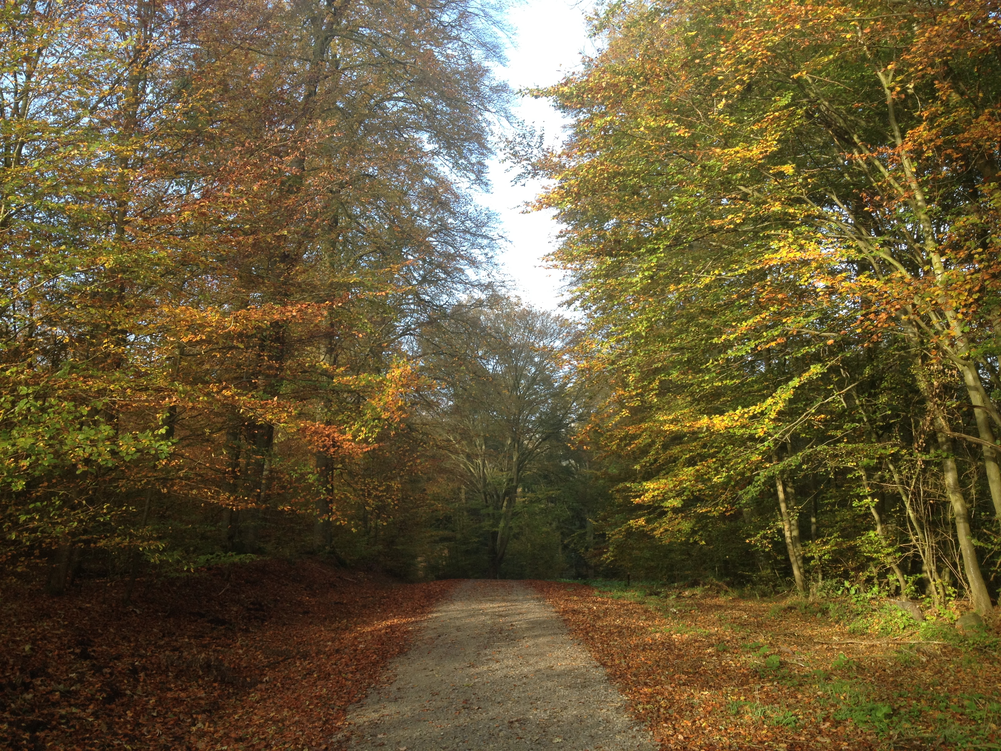 Der Fulda-Diemel-Weg (F) auf der Alten Wolfhager Straße zwischen Harleshausen und Ahnetal im Stadtgebiet von Kassel